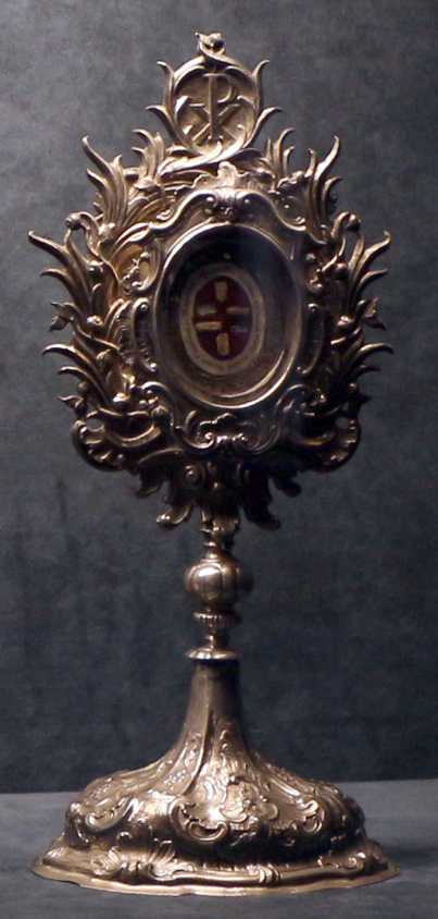 Palazzo Pretorio (Museo Diocesano Tridentino) This is a photo of a monument which is part of cultural heritage of Italy.